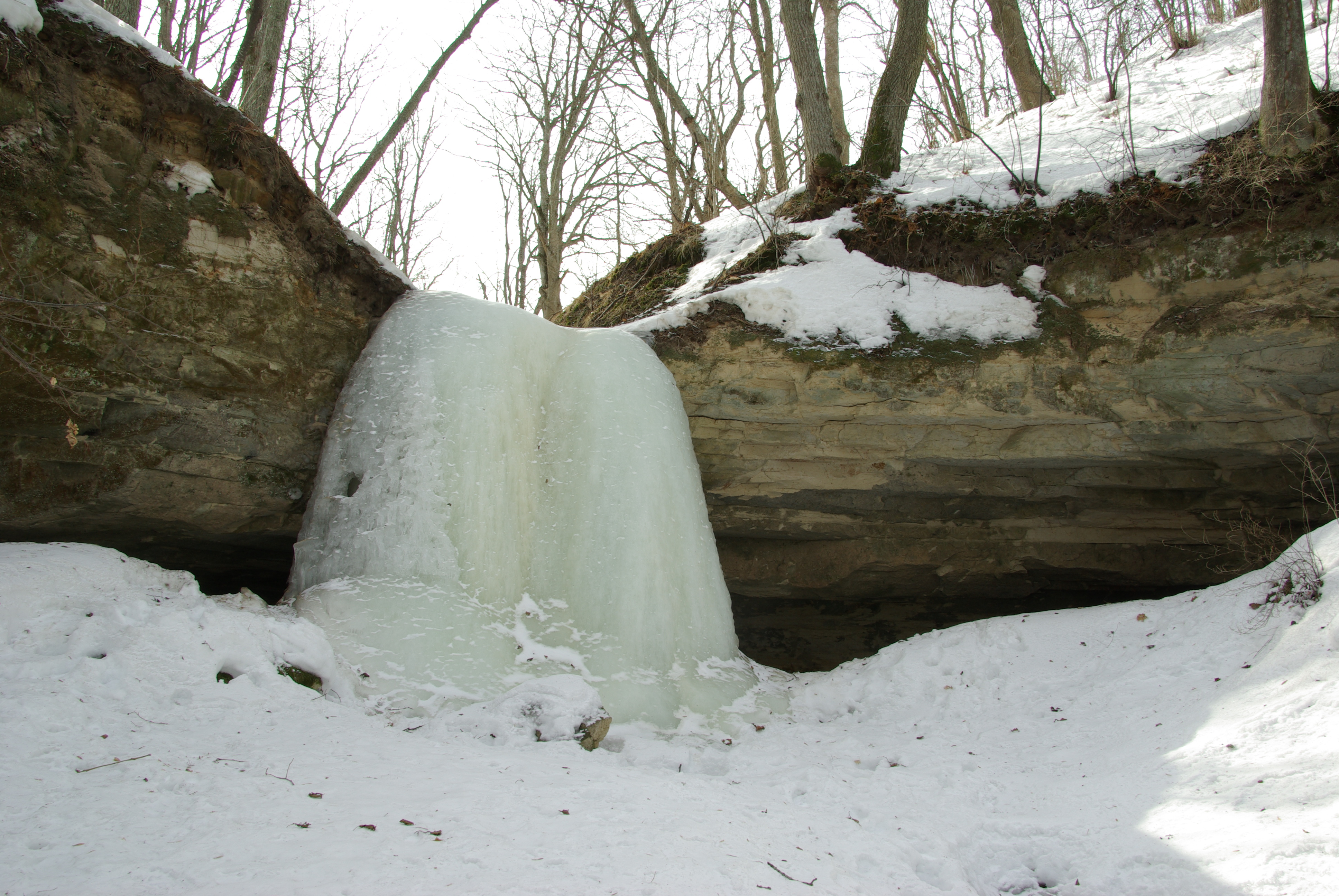 Turje keldri juga asub Harju maakonnas Kuusalu vallas Muuksi külas